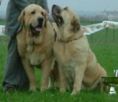 Coppia di mastini spagnoli